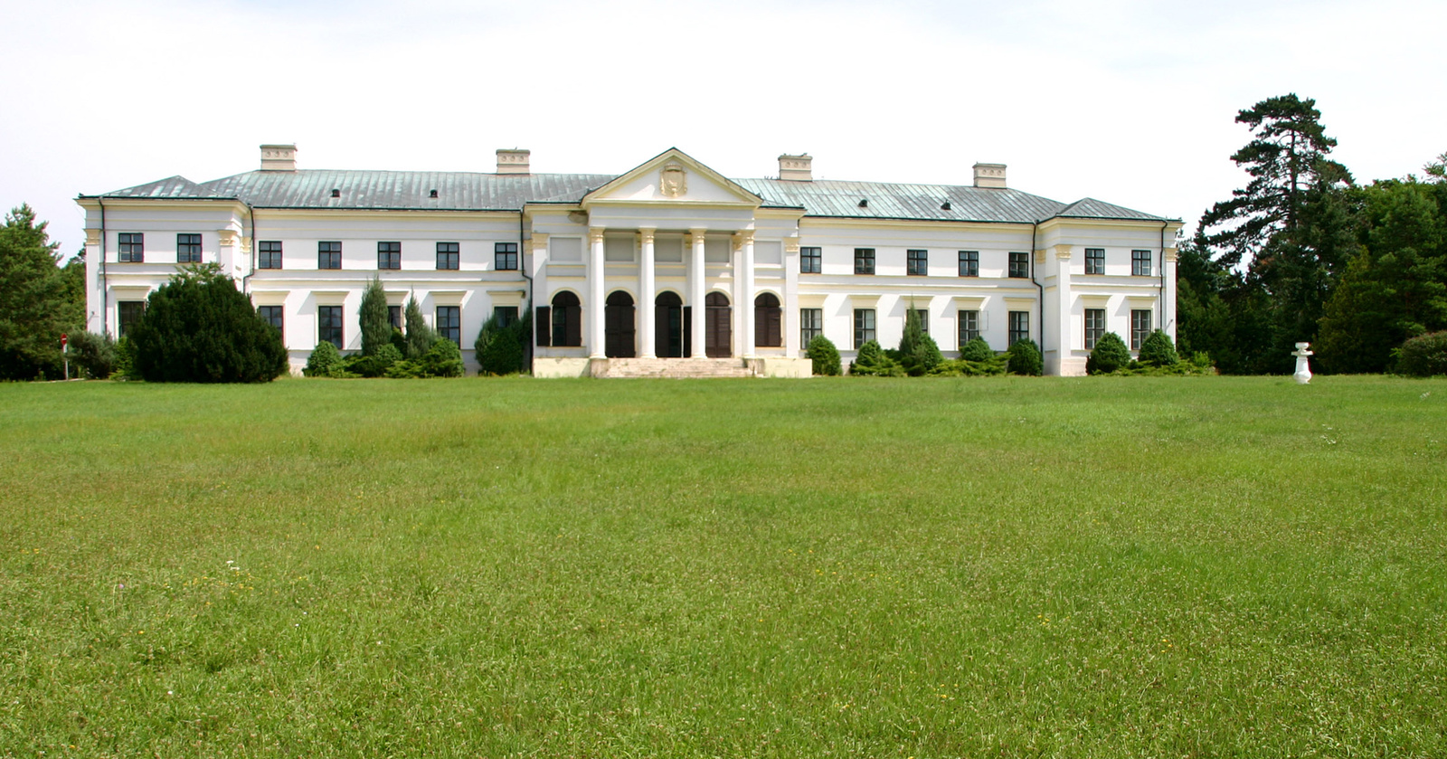 Zichy-Hadik-kastély (Seregélyes, Móra Ferenc utca)